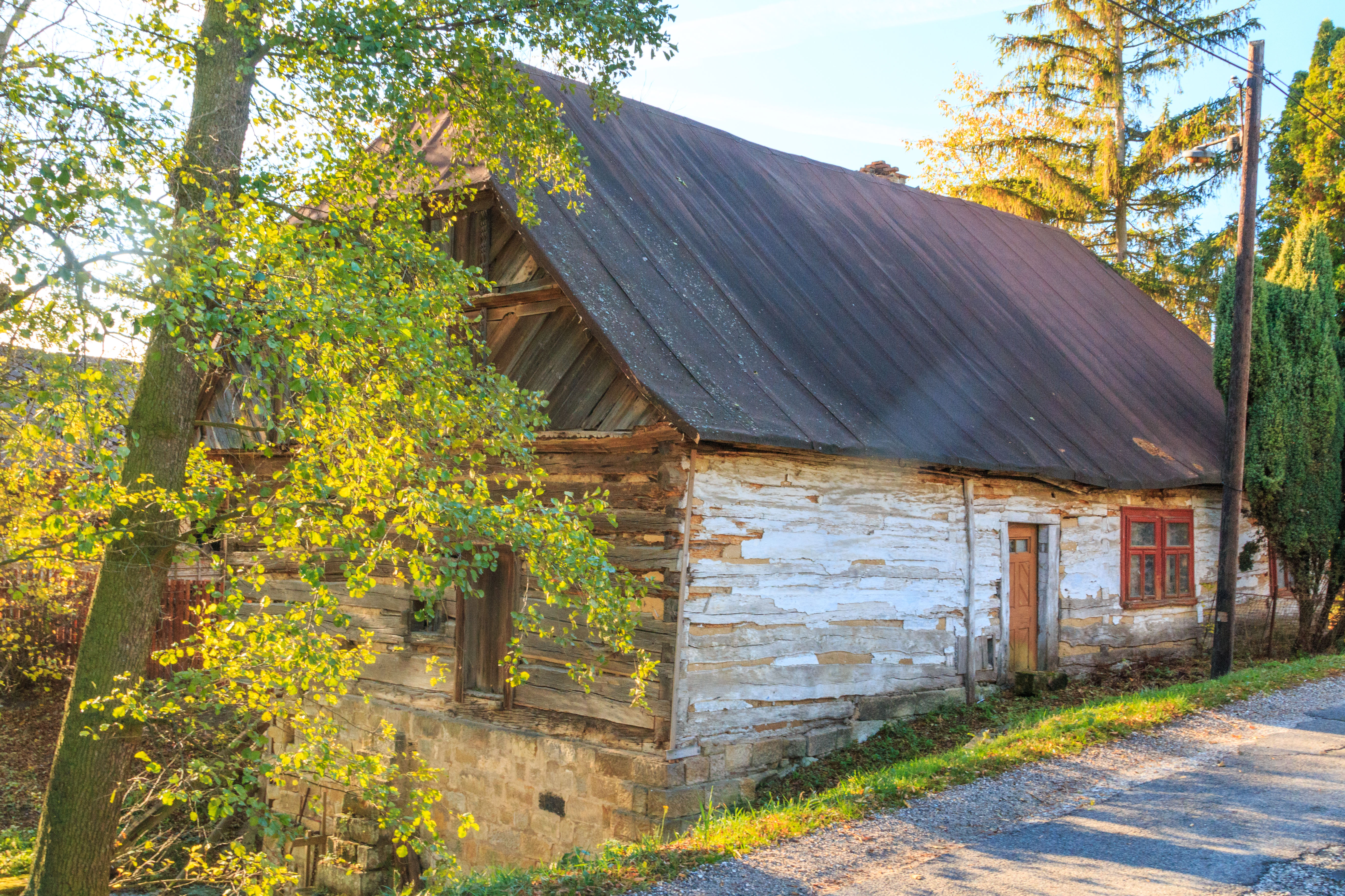 Vodní mlýn, Psinice 48, Psinice.